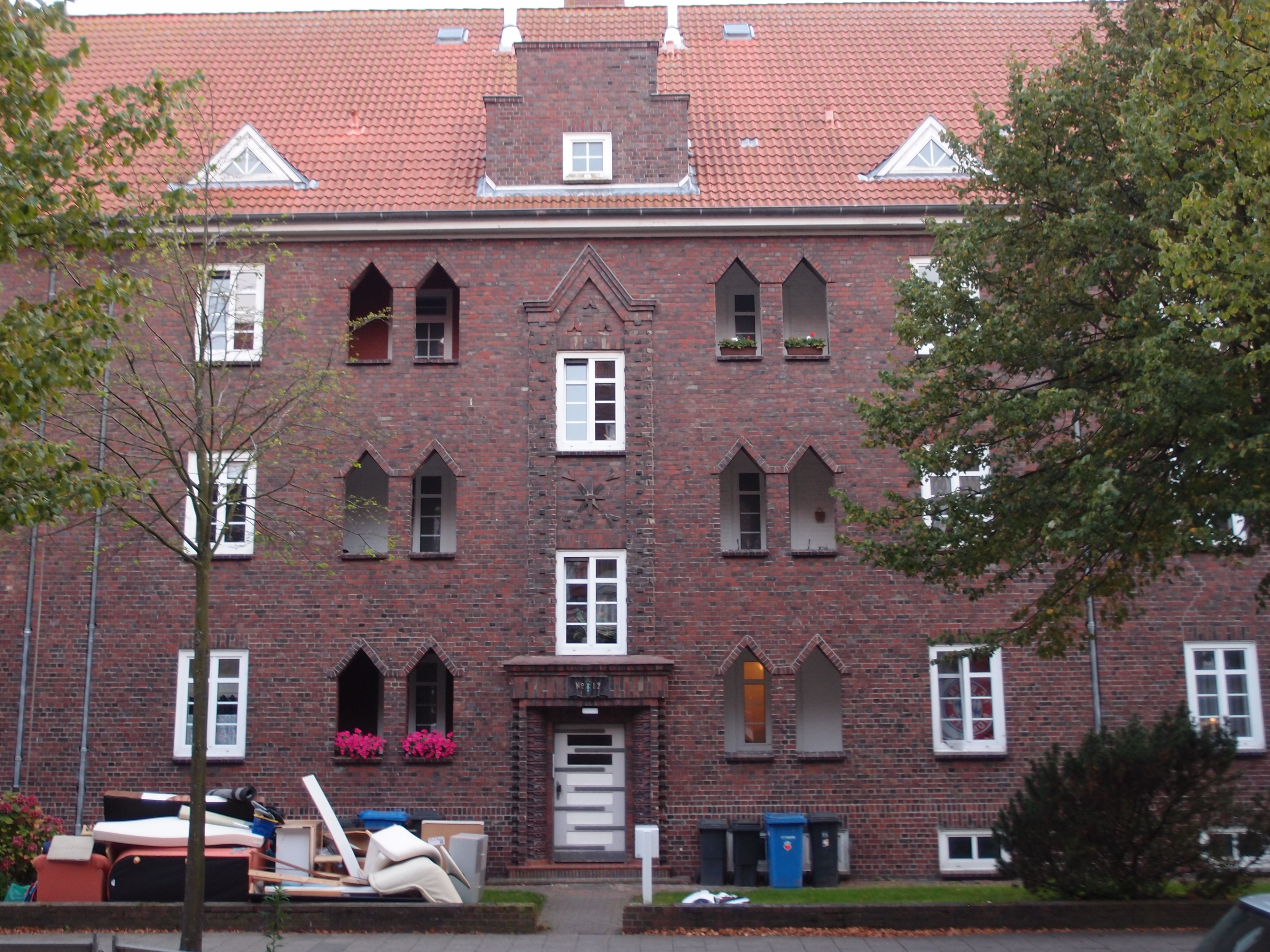 Cuxhaven, Gorch-Fock-Straße 19, Straßenansicht. Ensemble.